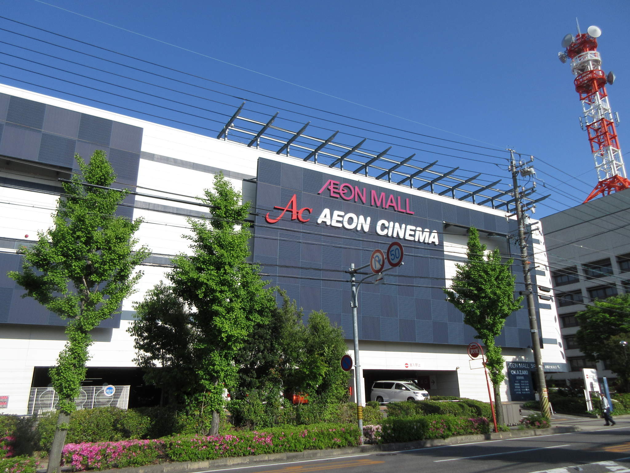 イオンモール岡崎